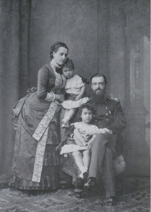 Князь Сергей Илларионович Васильчиков (1849-1926), с супругой Марией Николаевной (1853-1922; ур. Исакова) и детьми - Илларионом (1881-1969) И Софьей (1879-1927).